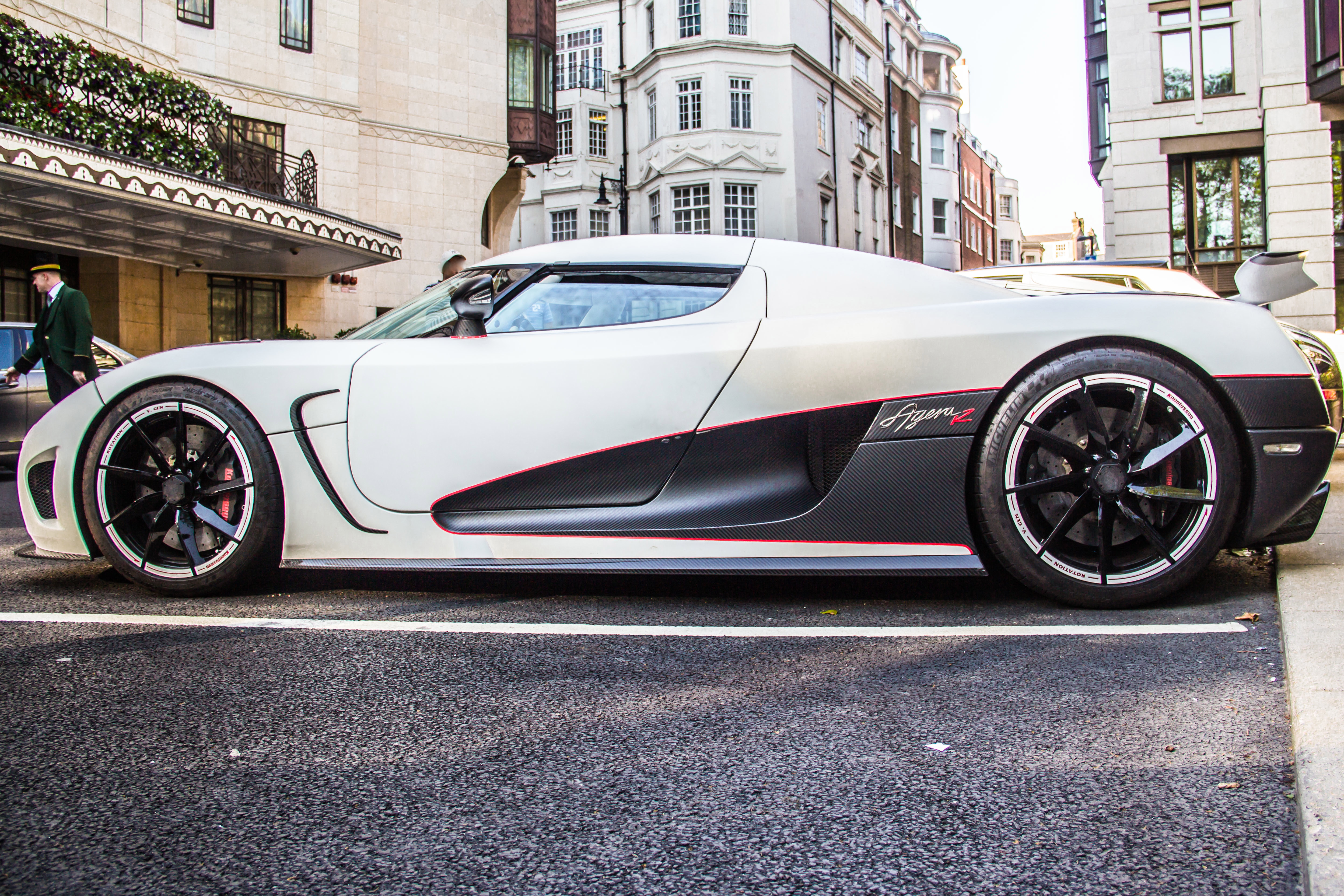 Agera R